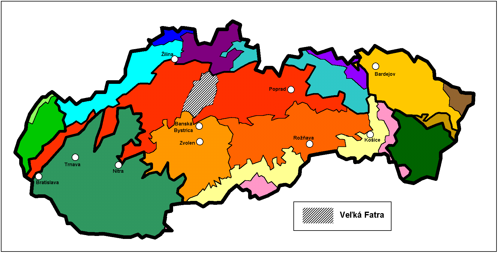 Velka Fatra